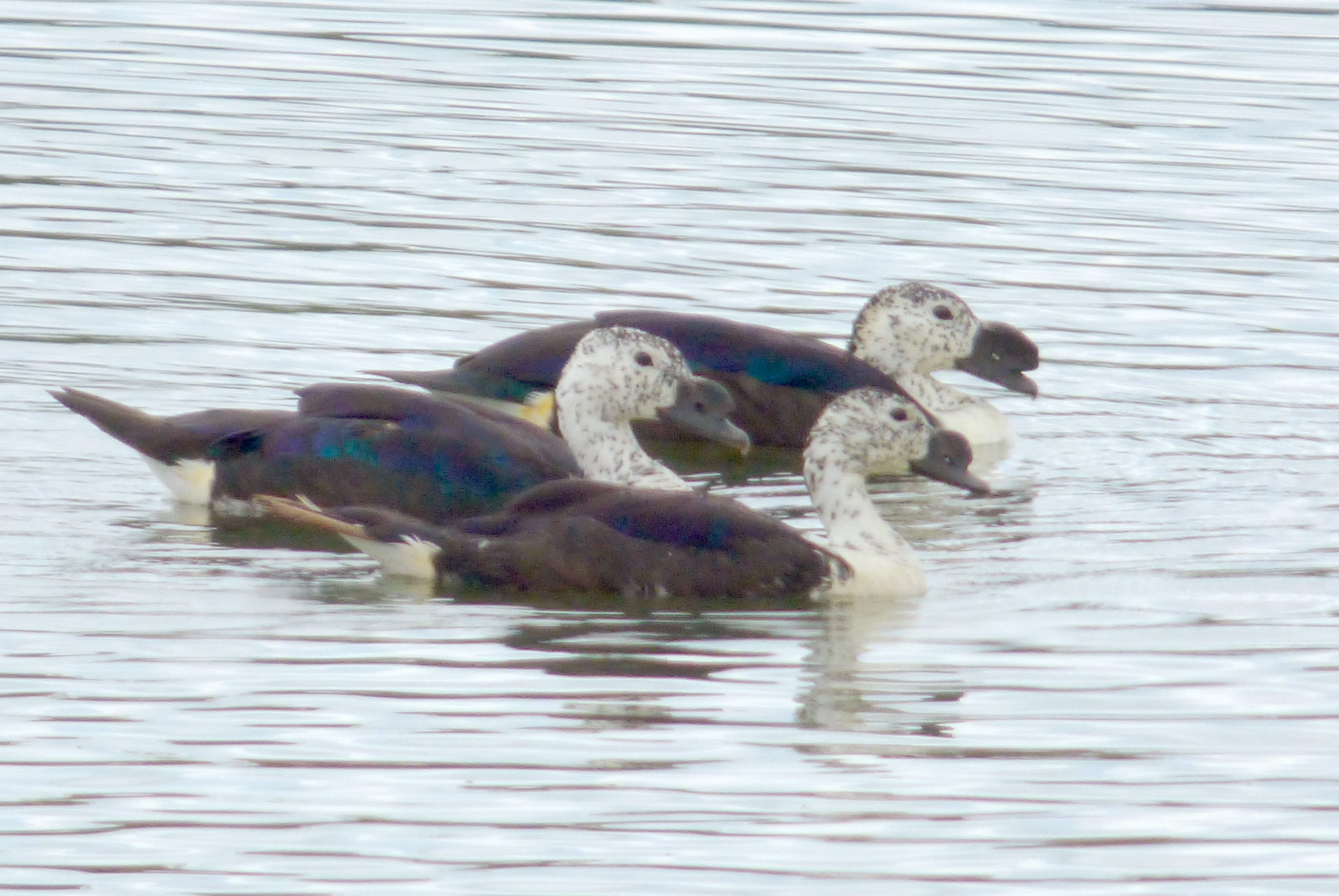 Sarkidiornis sylvicola (Pato moñudo), Colombia